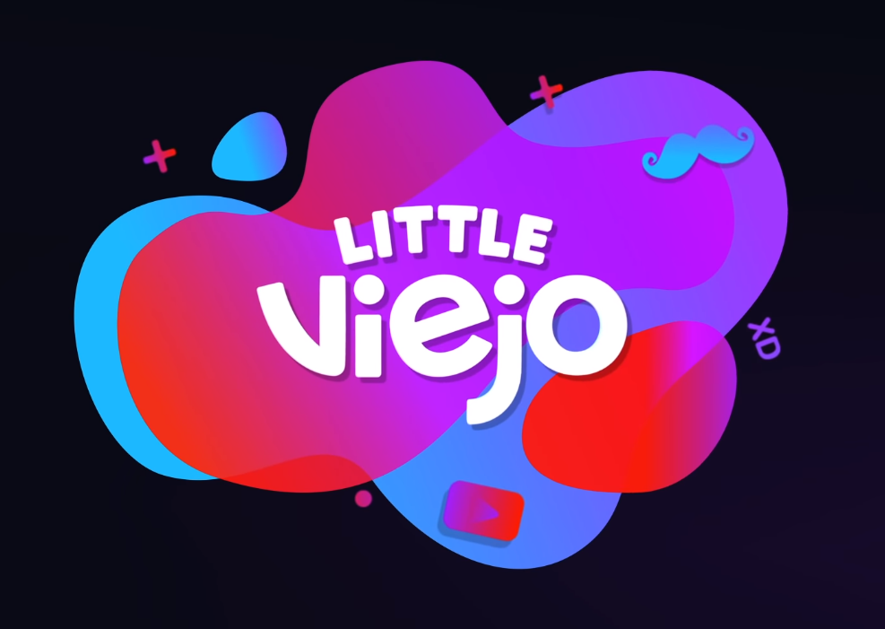 Logo oficial de Little Viejo